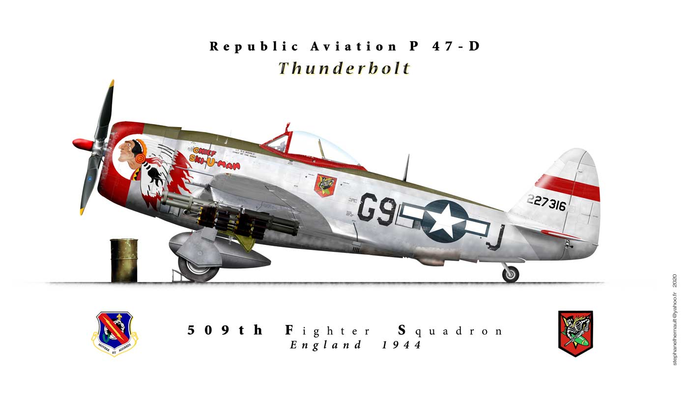 profil dessin P47D 509th Fighter Squadron 1944